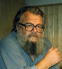 Porträt Nikolaus Berwanger